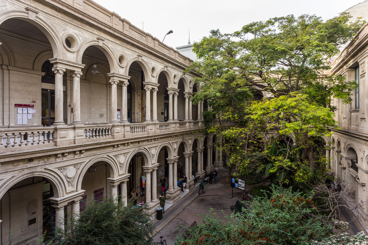 Universidad de la República. Ubicada en el departamento de Montevideo